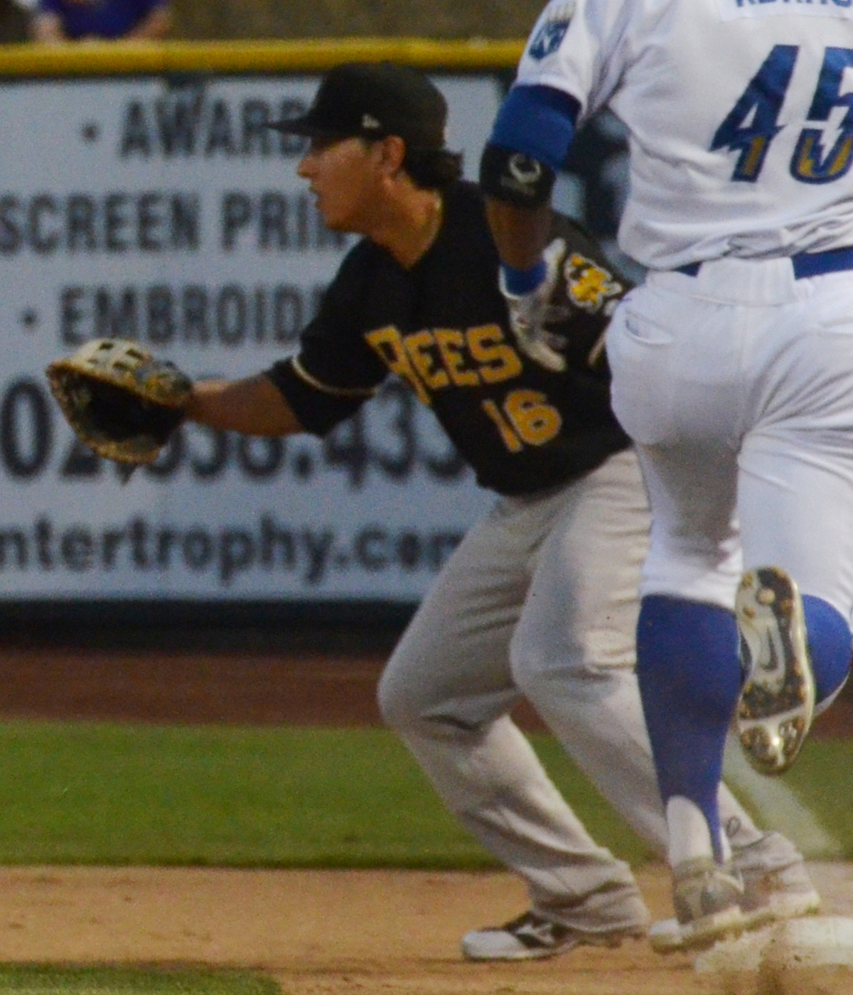 Efren Navarro